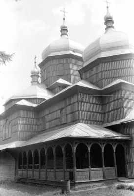 Церква в Ямниці Тисменицького району. Збудована у 1932 році за проектом Льва Левинського.: Ямниця (Тисменицький район Івано-Франківської області). Дерев'яна церква. Вигляд з північного заходу.